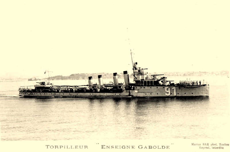 Contre-torpilleur Enseigne Gabolde (Classe Enseigne Roux)